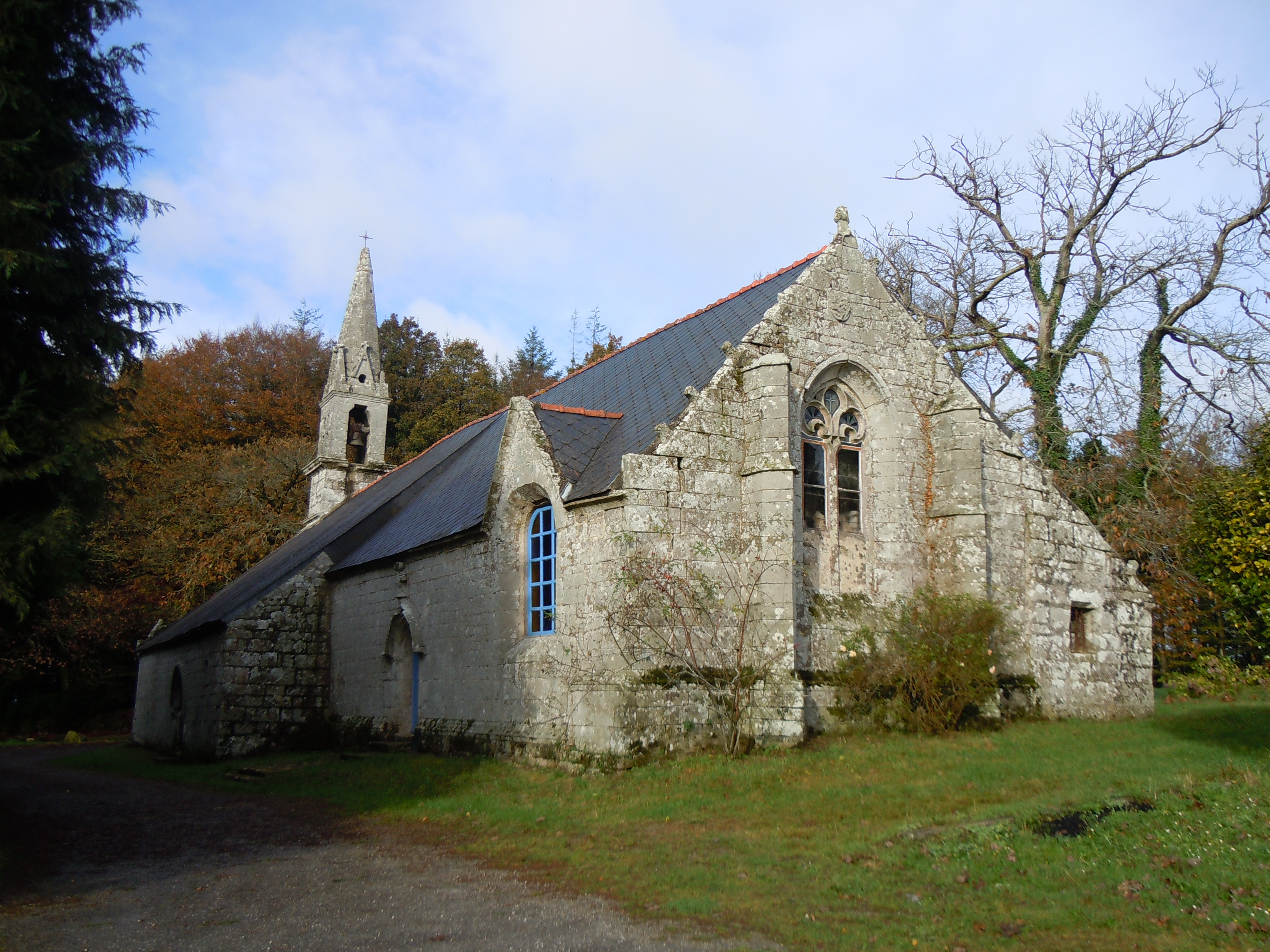 chapelle de Lochrist en Ploërdut, département du Morbihan (vue du chevet et de la façade méridionale)